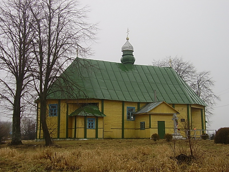 Вялікія Жухавічы. Свята-Петра-Паўлаўская царква